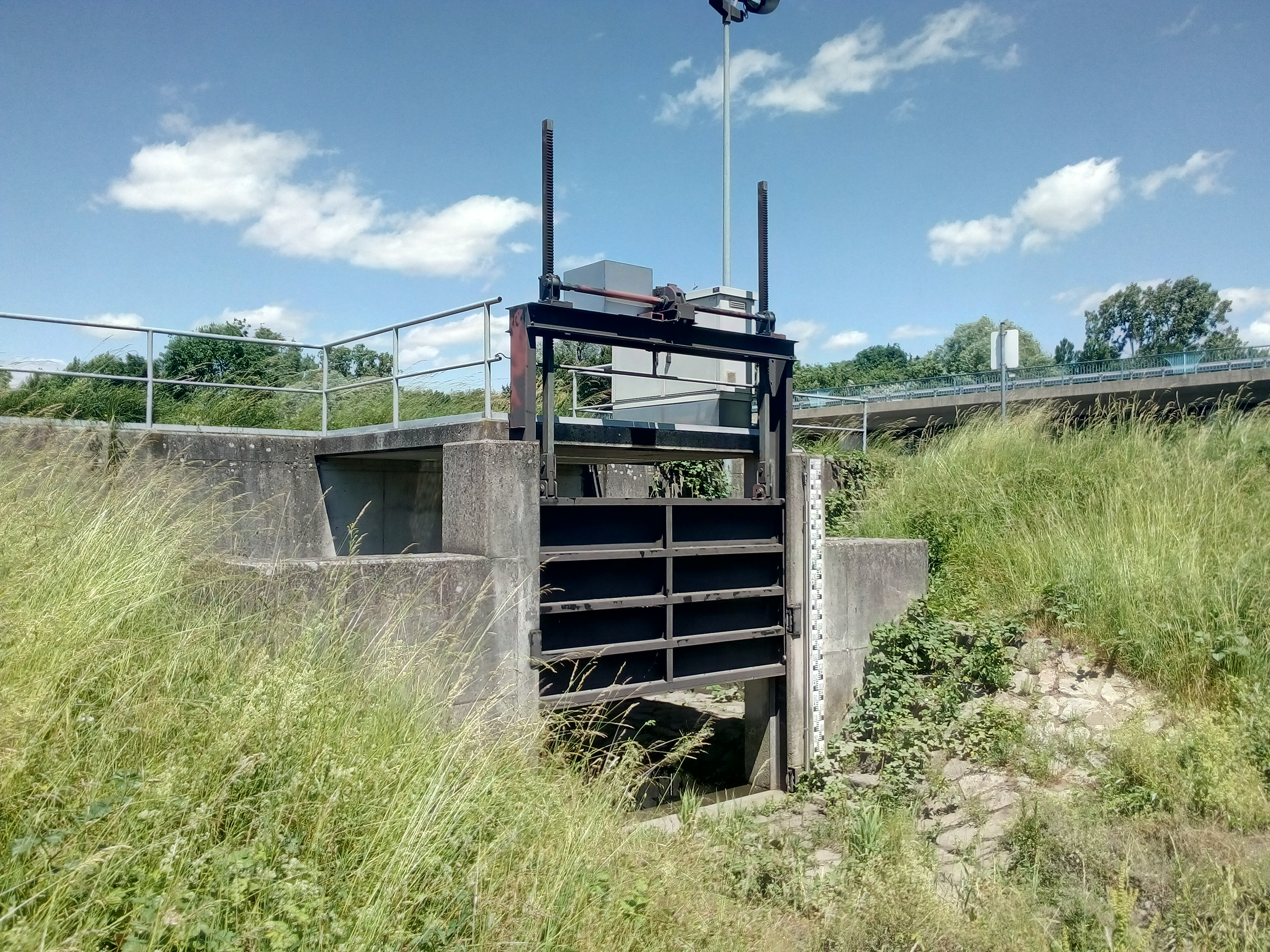 Grundauslass des Hochwasserrückhaltebeckens 19 am Froschgraben (auch Froschbächel genannt) in Bühl (Baden)